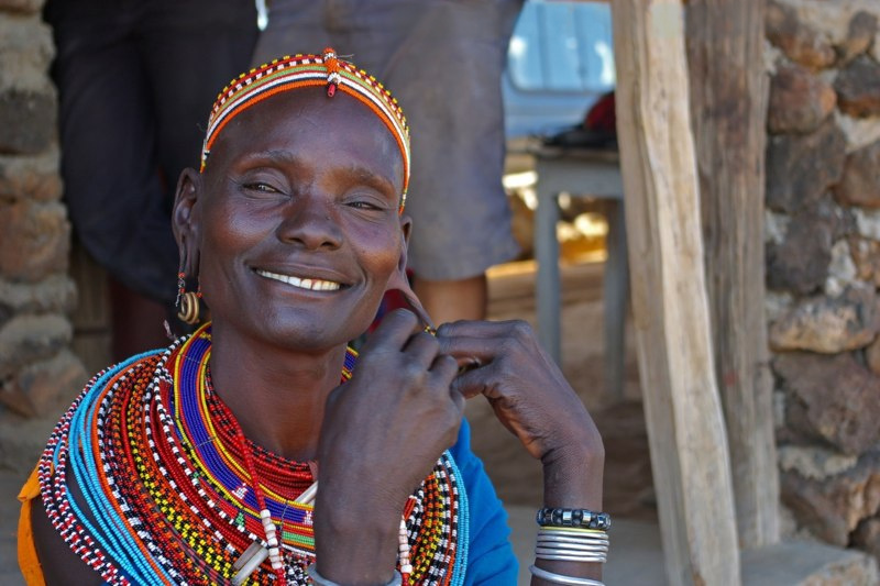 Femme samburu - documentaire Umoja, le village interdit aux hommes de Jean Crousillac et Jean-Marc Sainclair.